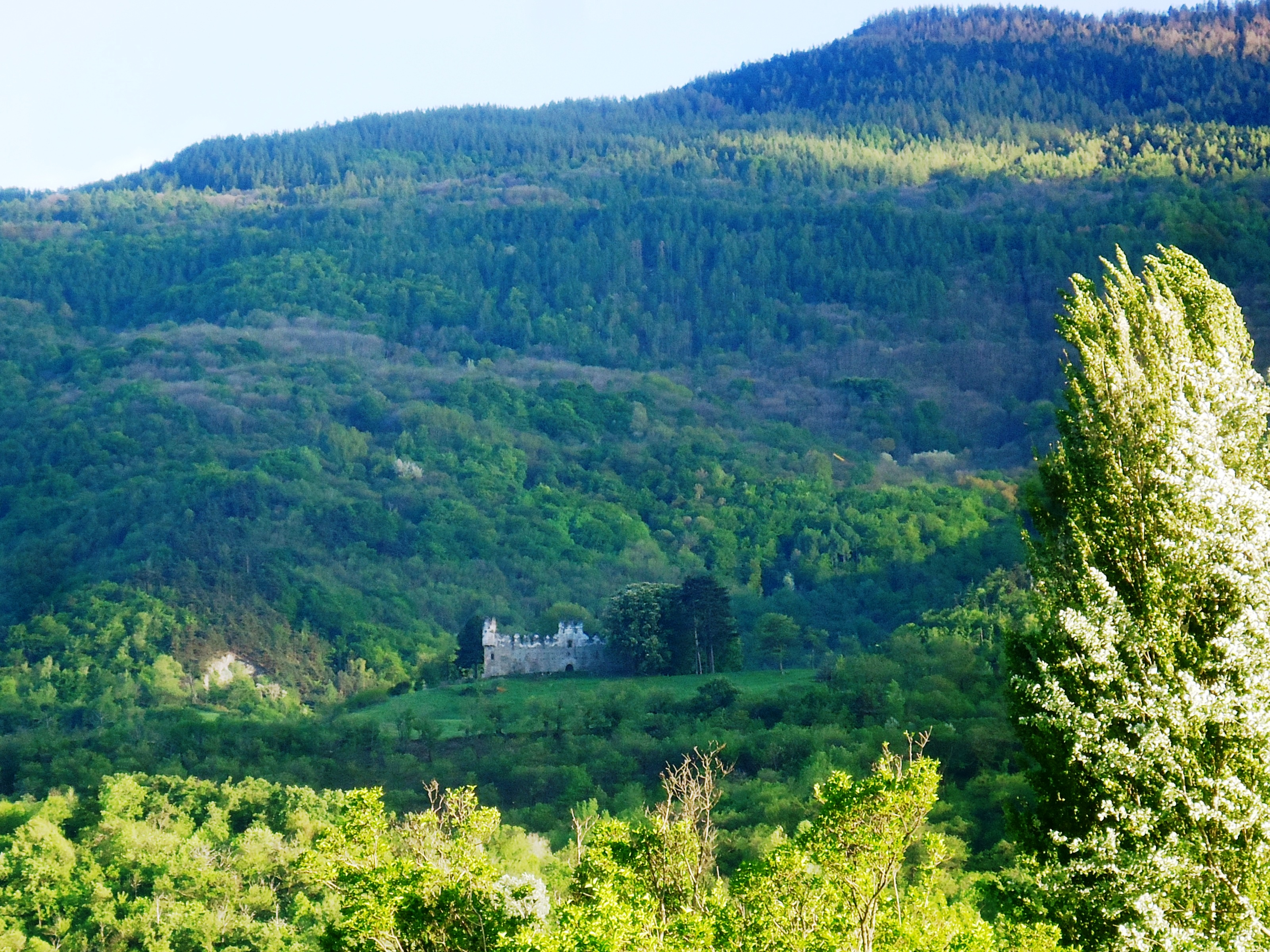 Castello Borello di Bussoleno